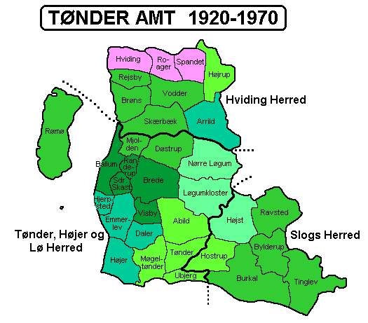 Tønder Amt 1920-1970. Kortet er udarbejdet af Svend-Erik Christiansen. Farvelagt af Lars Helbo - med grønne nuancer er markeret kommuner, der gik til Sønderjyllands Amt efter Kommunalreformen 1970, med lilla tre sogne, der gik til Ribe Amt. Kopieret fra den danske Wikipedia. Map of Tønder County, Denmark (1920-1970). Map by Svend-Erik Christiansen. Colours by Lars Helbro. The green nuances show parts of the province that became part of South Jutland County in 1970. The red areas were transferred to Ribe County in 1970. Copied from the Danish Wikipedia.